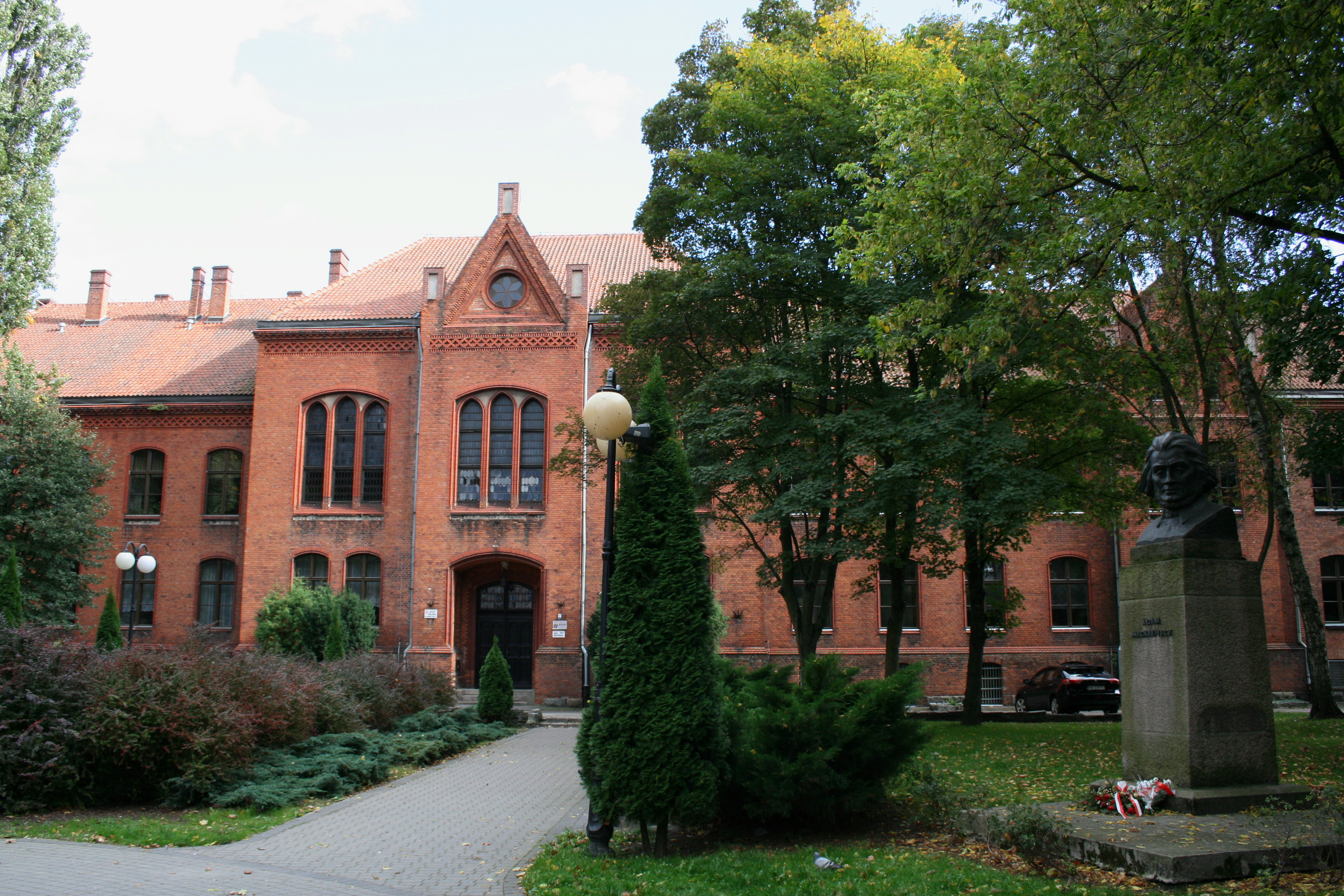 Olsztyn, ul. Adama Mickiewicza 6 - dawne gimnazjum męskie, obecnie liceum ogólnokształcące (zabytek nr A-2429)